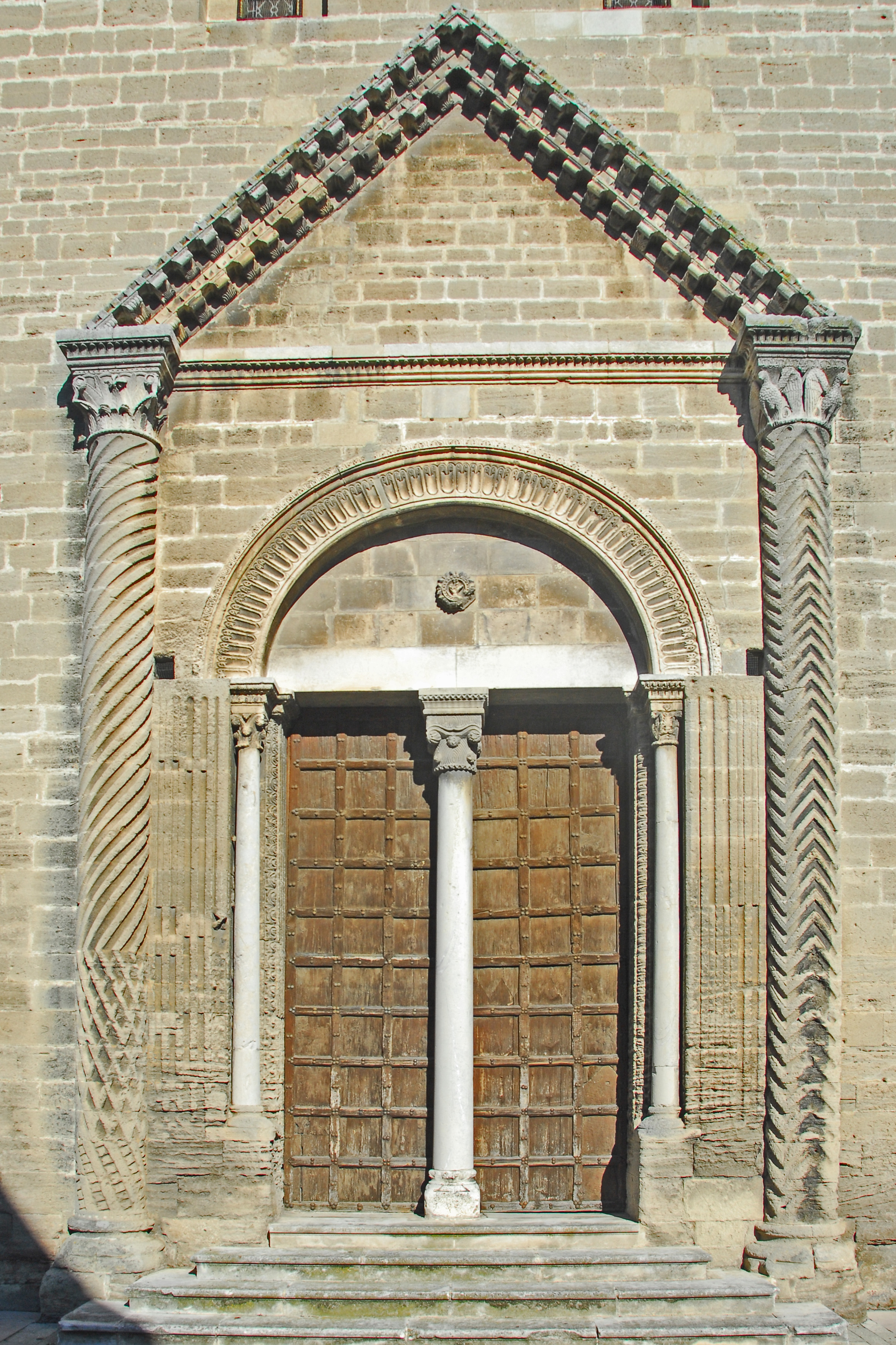 N-D-du-Lac du Le Thor, Westportal in Fassade